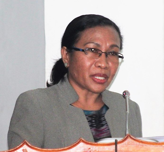 Jesuína Maria Ferreira Gomes, Provedoria dos Direitos Humanos e Justiça